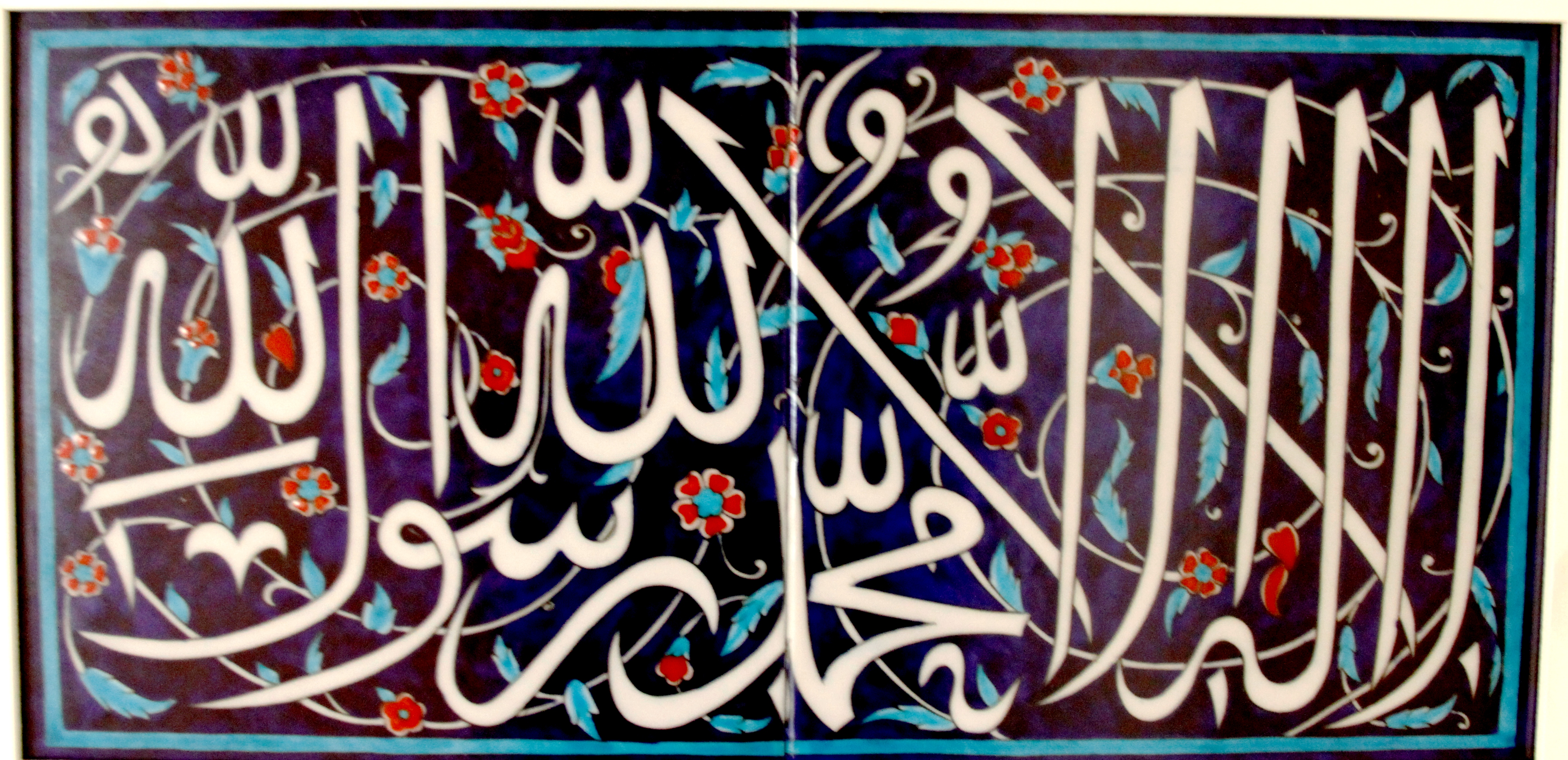 Inscrição em árabe da Chahada ("Não há outro deus além de Alá; Maomé é o mensageiro de Alá.") num par de azulejos de Iznik